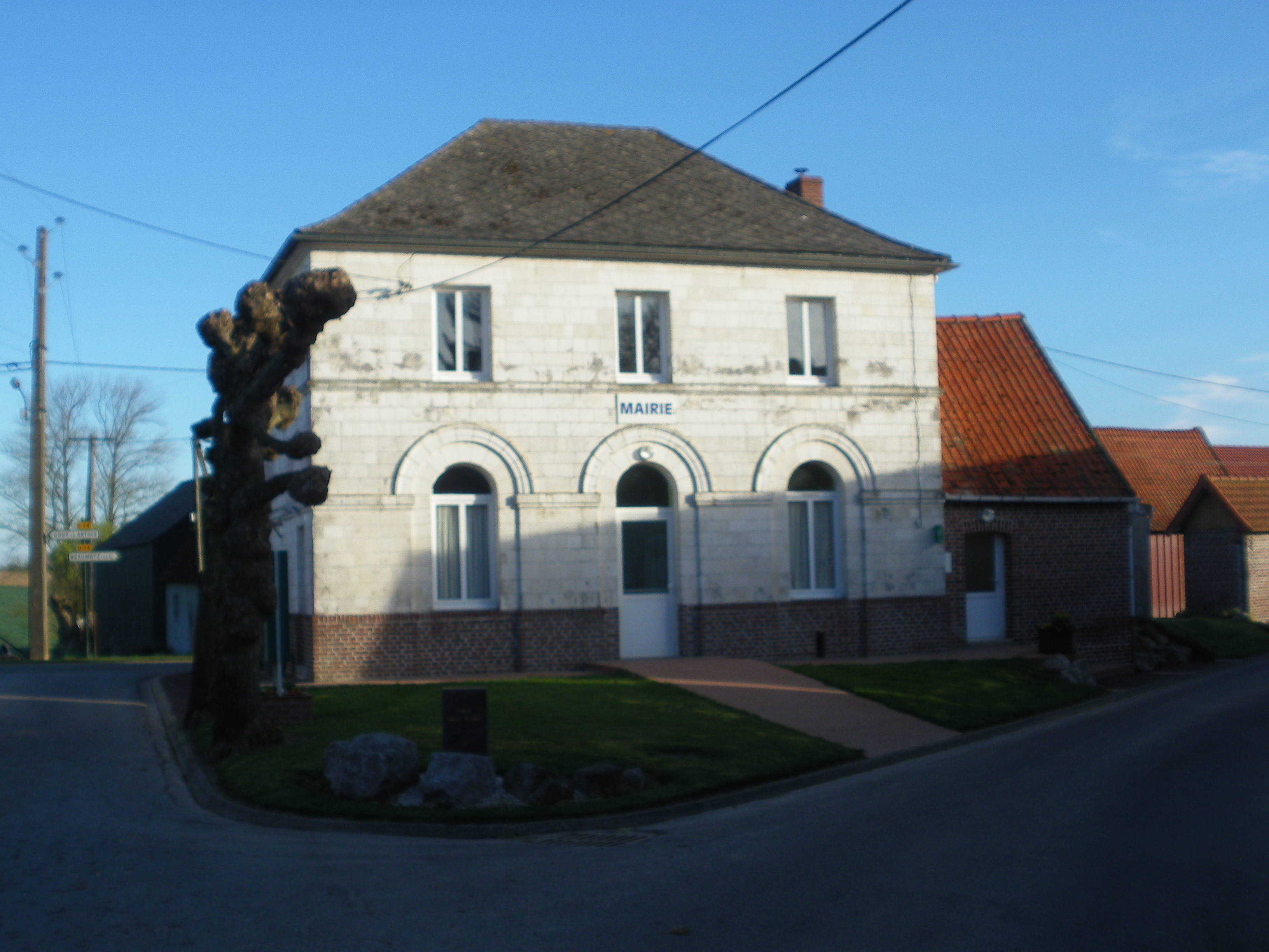 Vue de la mairie de Monchiet.